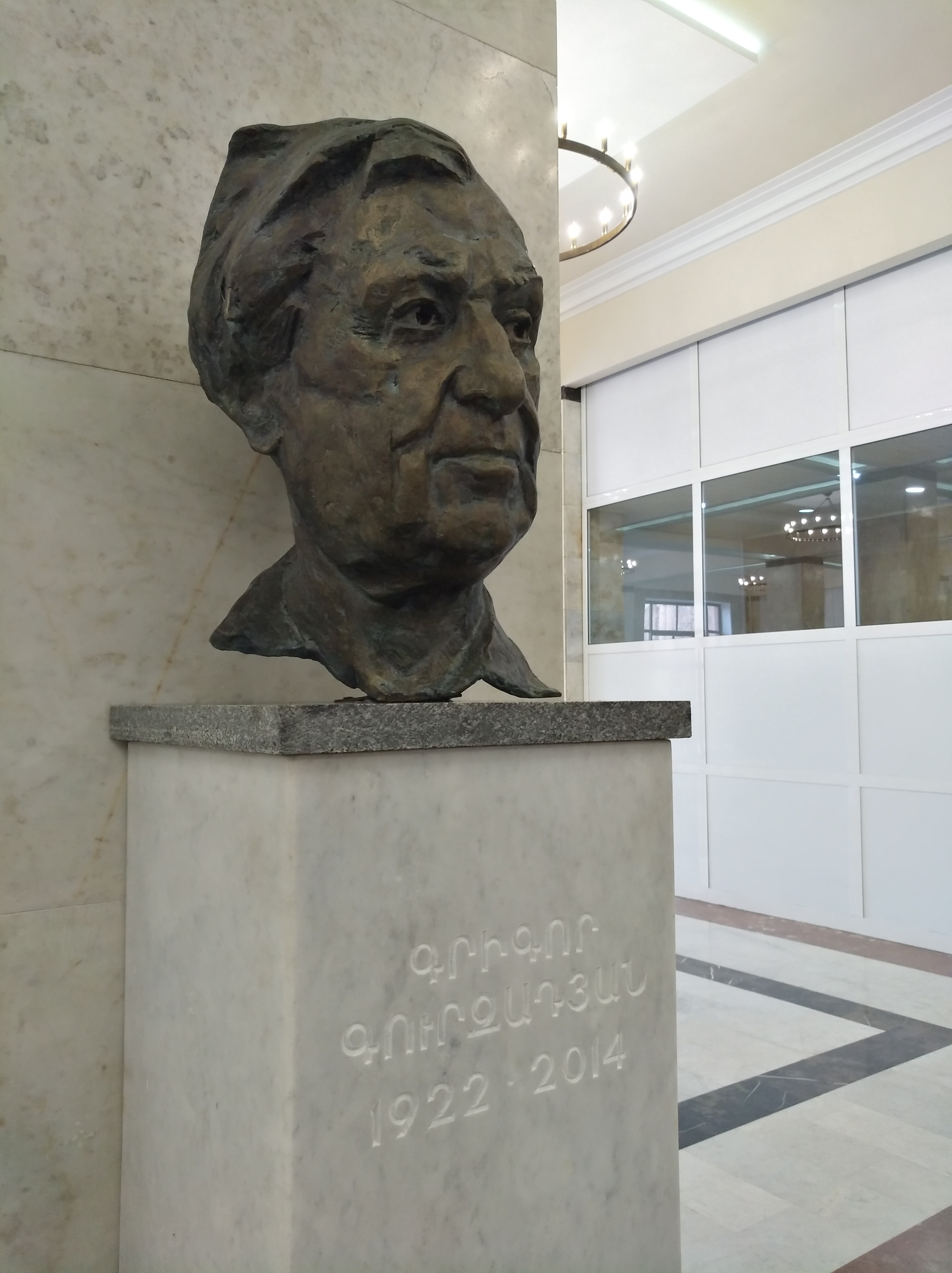 Գրիգոր Գուրզադյանի կիսանդրին ԵՊՀ-ում